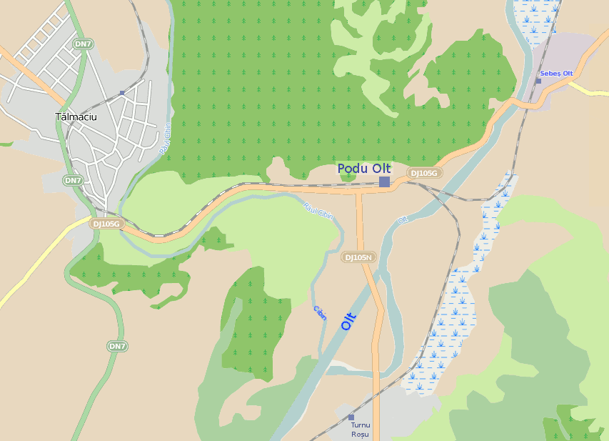 Lage des Bahnhofs Podu Olt (Kreis Hermannstadt)